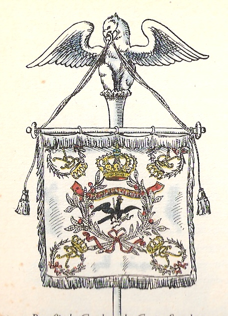 Standarte der preußischen Garde-du-Corps 1740-1798